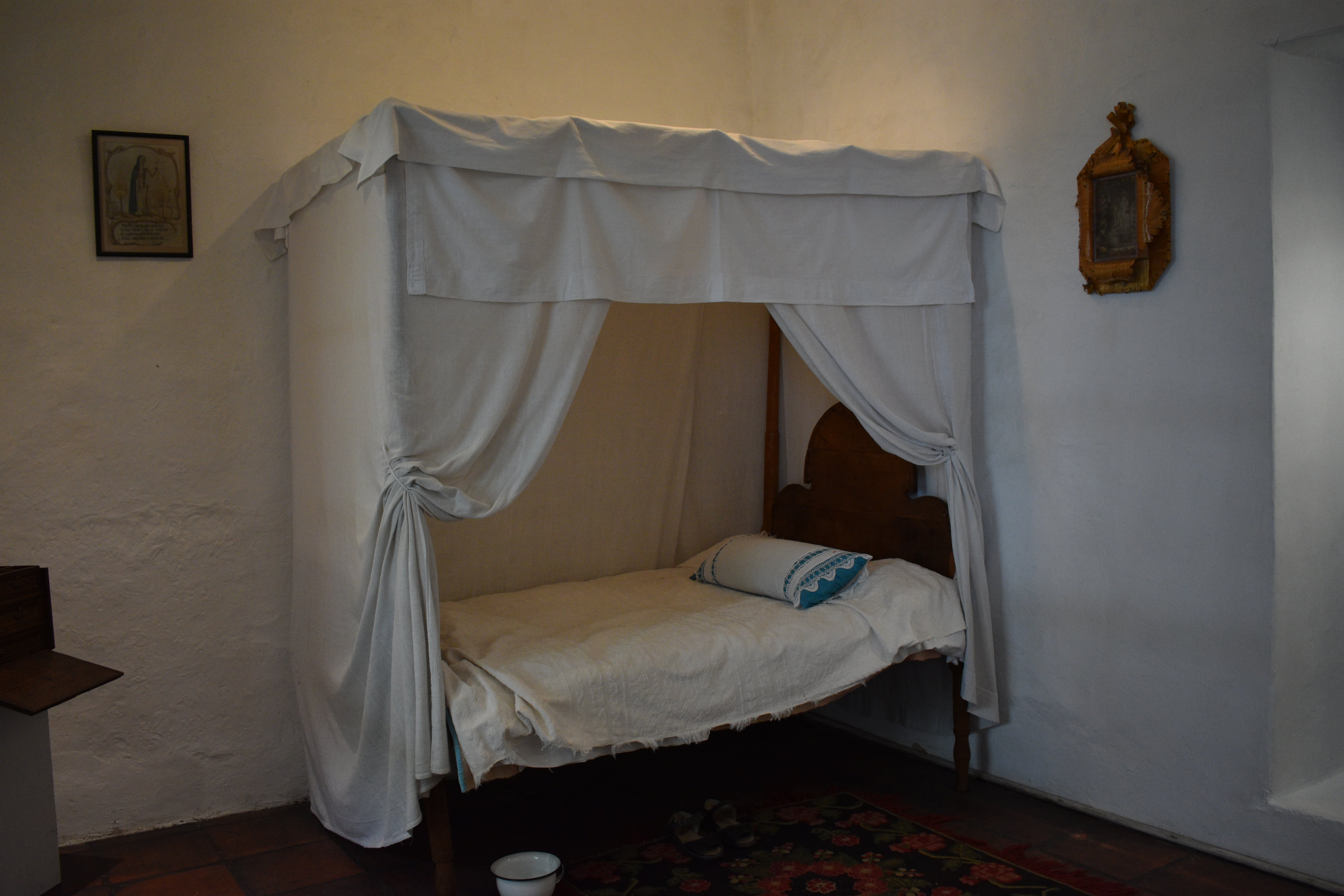 Celda de las jovenes